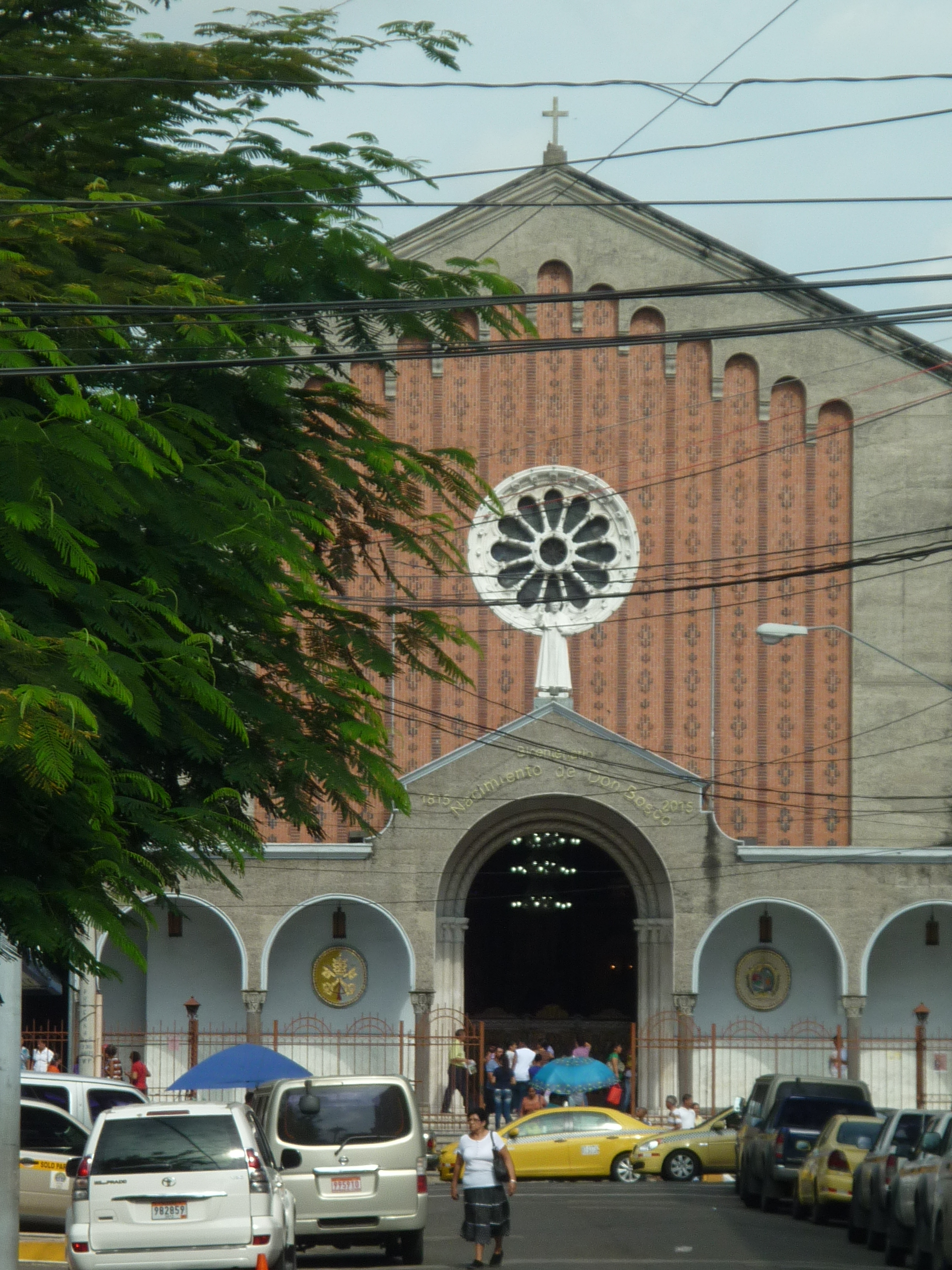 Calidonia, Panamá Rep. de Panamá